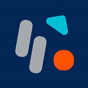 中文（台灣）: 品牌識別 臺北流行音樂中心LOGO 無論載具為何，這幾個按鈕總會如同難忘的旋律般牽動你心。臺北流行音樂中心的品牌識別，藉由音樂播放器相關的幾何意象組合，象徵北流的場館及整體環境，如同北流的願景：「邁向未來、當下永恆、累積傳承」，期許立足台北、展望世界。